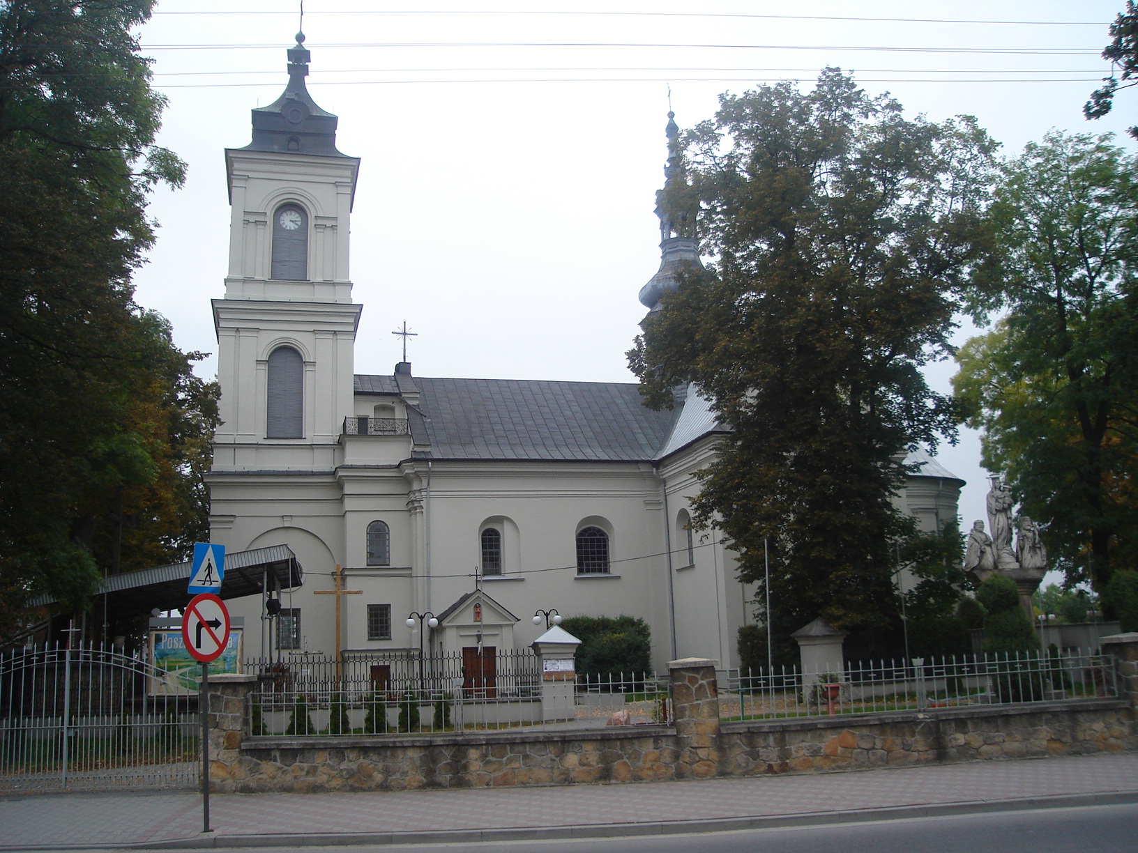 Kościół pw. Wniebowzięcia Najświętszej Marii Panny we Włoszczowie (zabytek nr rejestr. 226)